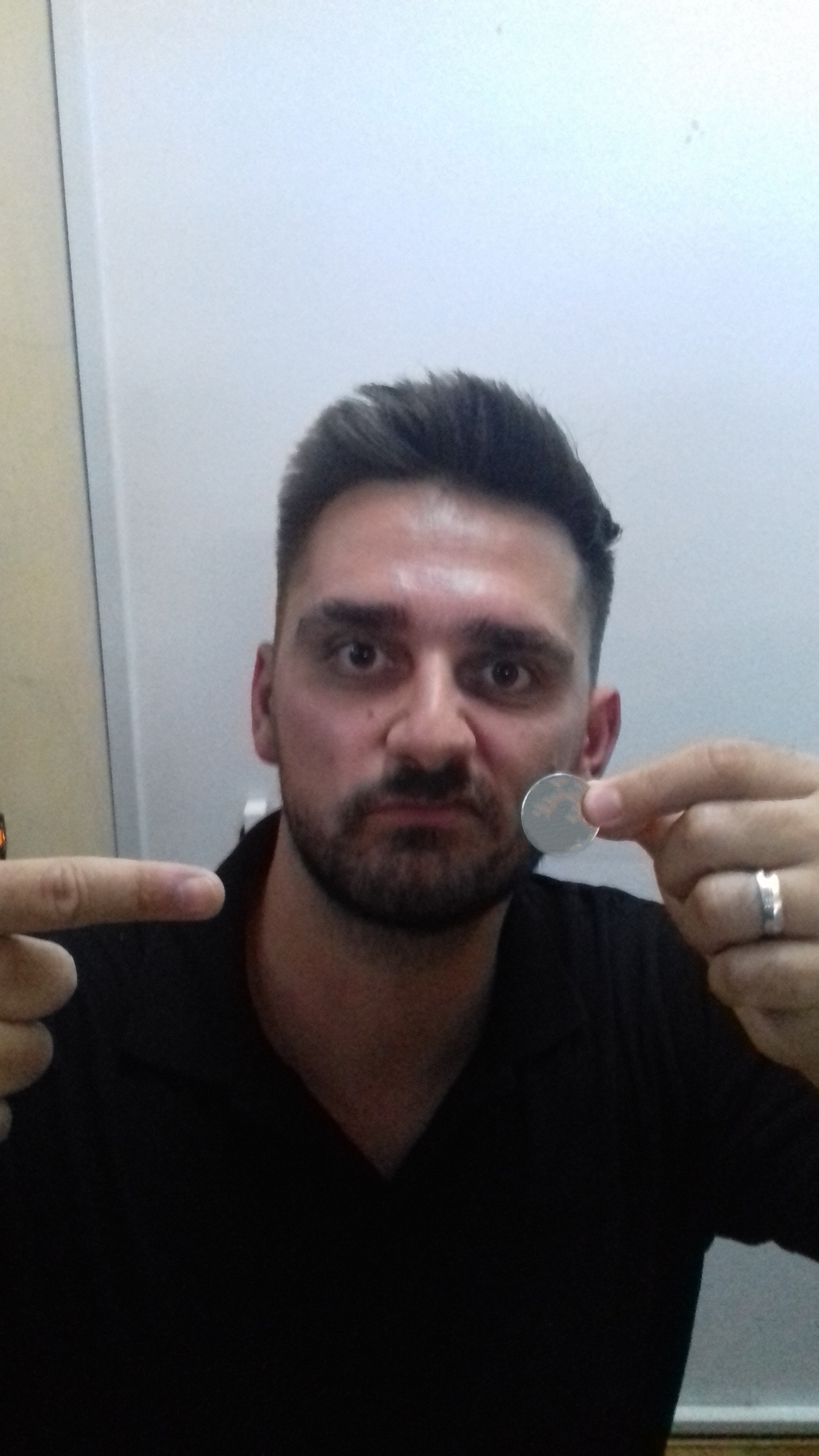 Бх. репер Френки на докуМфесту у Зеници, гдје је био један од учесника јавне трибине и презентовао свој биографски роман Кораци